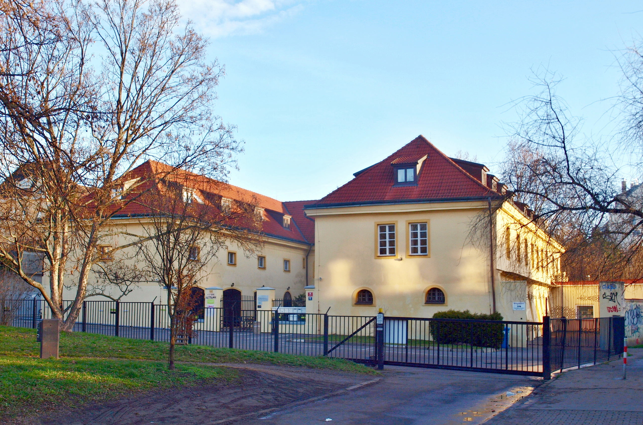 Strašnice, Bečvářův dvůr